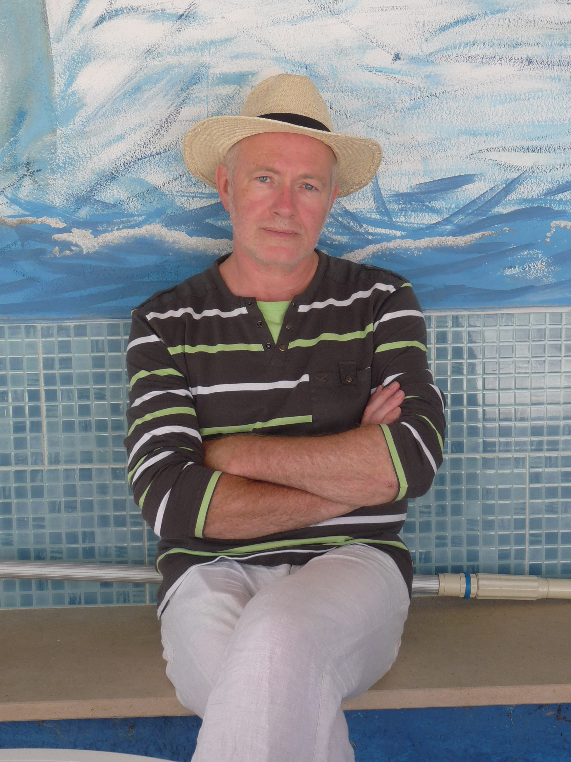 Dominique Massaut, poète et slameur.